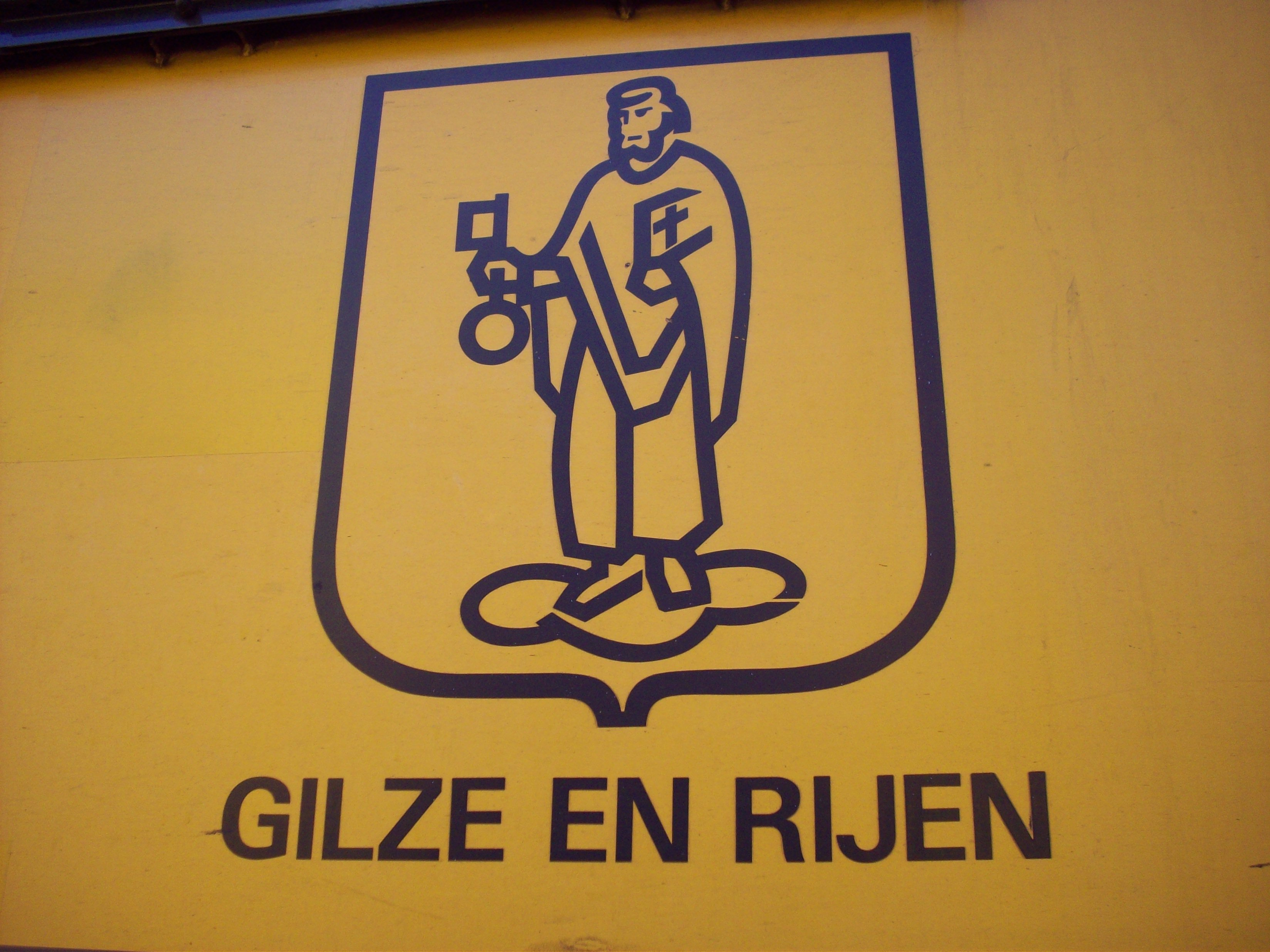 Het wapen van Gilze en Rijen, op de zijkant van NS e-loc 1736.